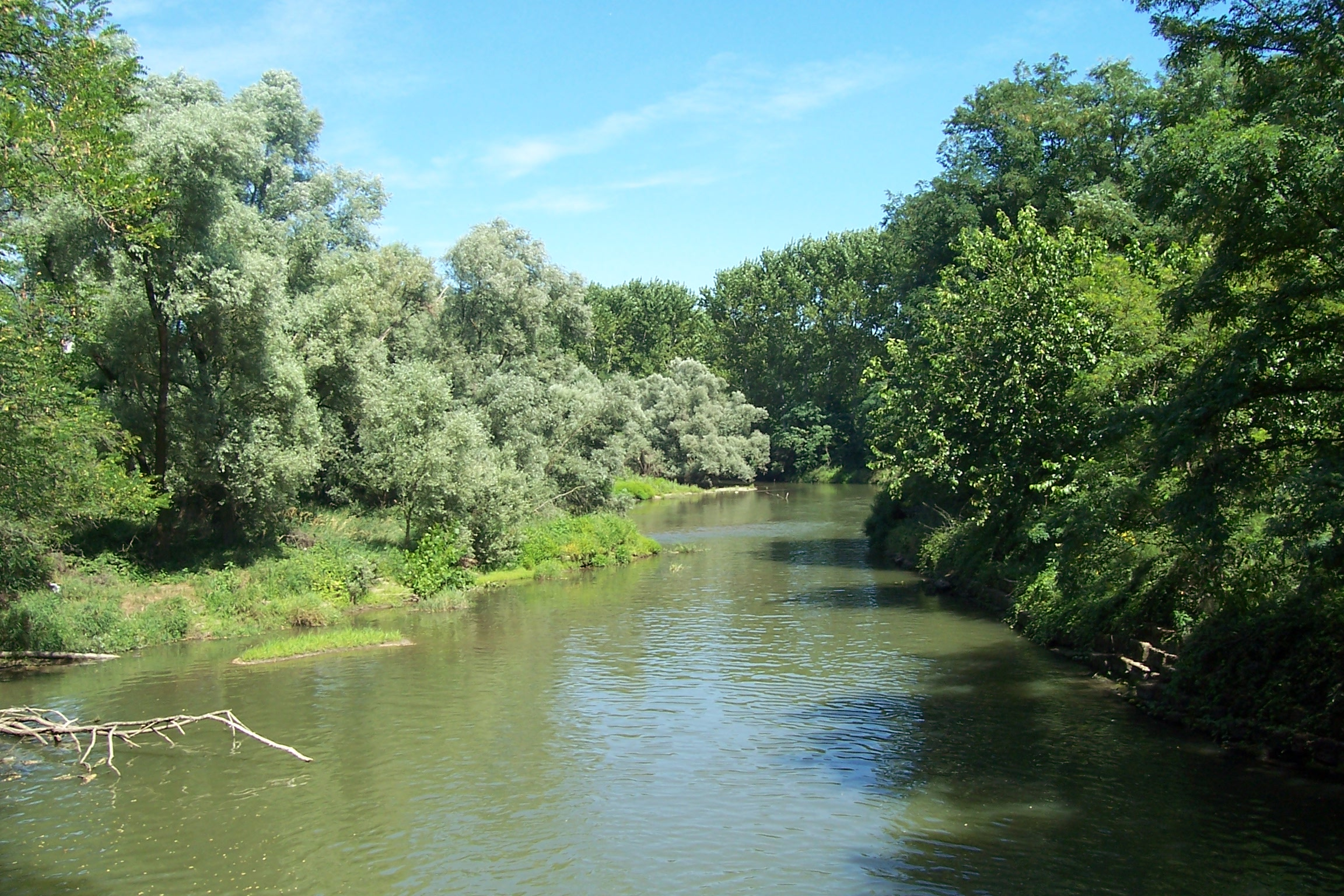 L'Olona inferiore in territorio di Genzone